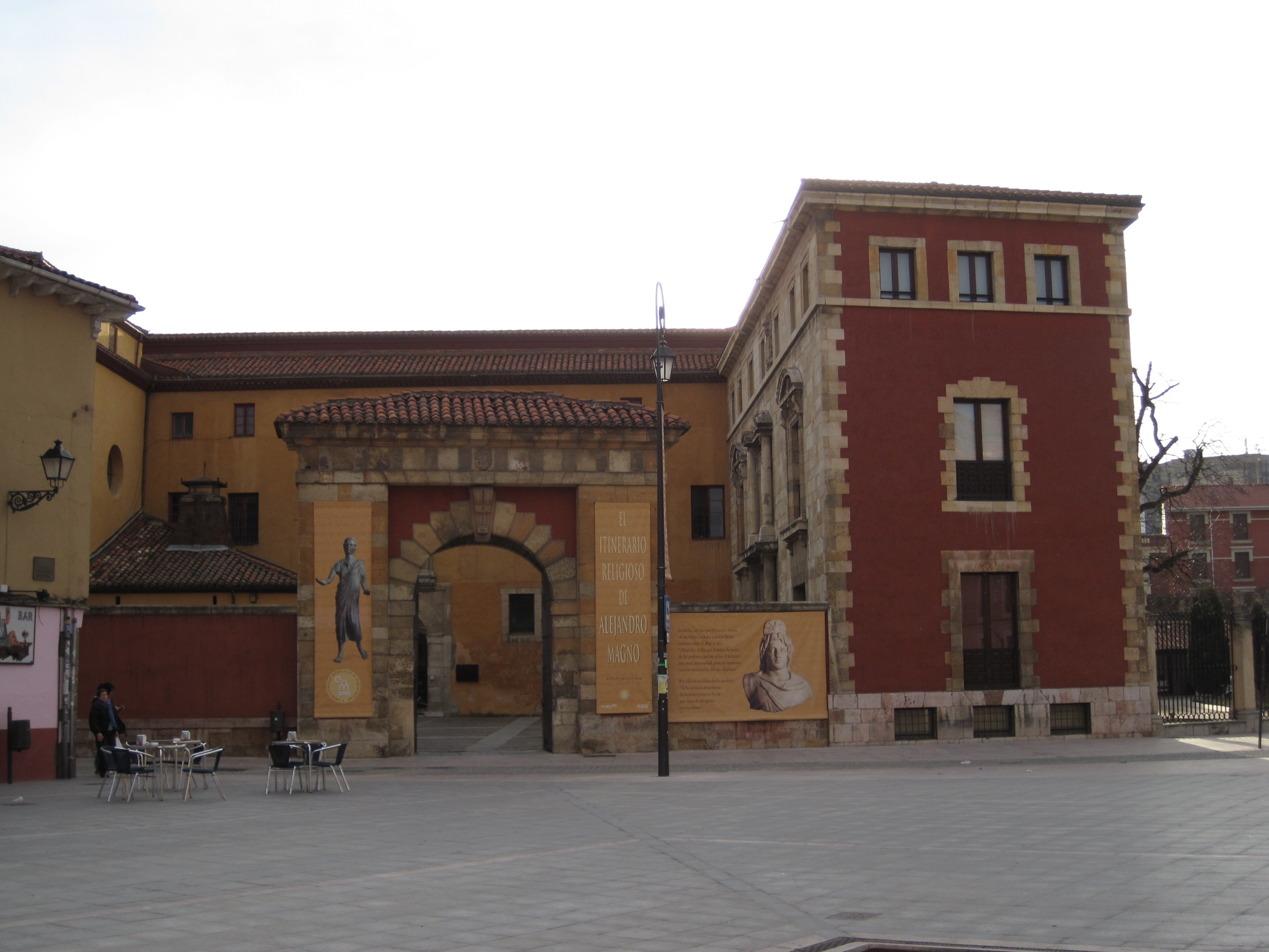 León: Entrada lateral de San Isidoro para acceder al Museo Bíblico y Oriental.